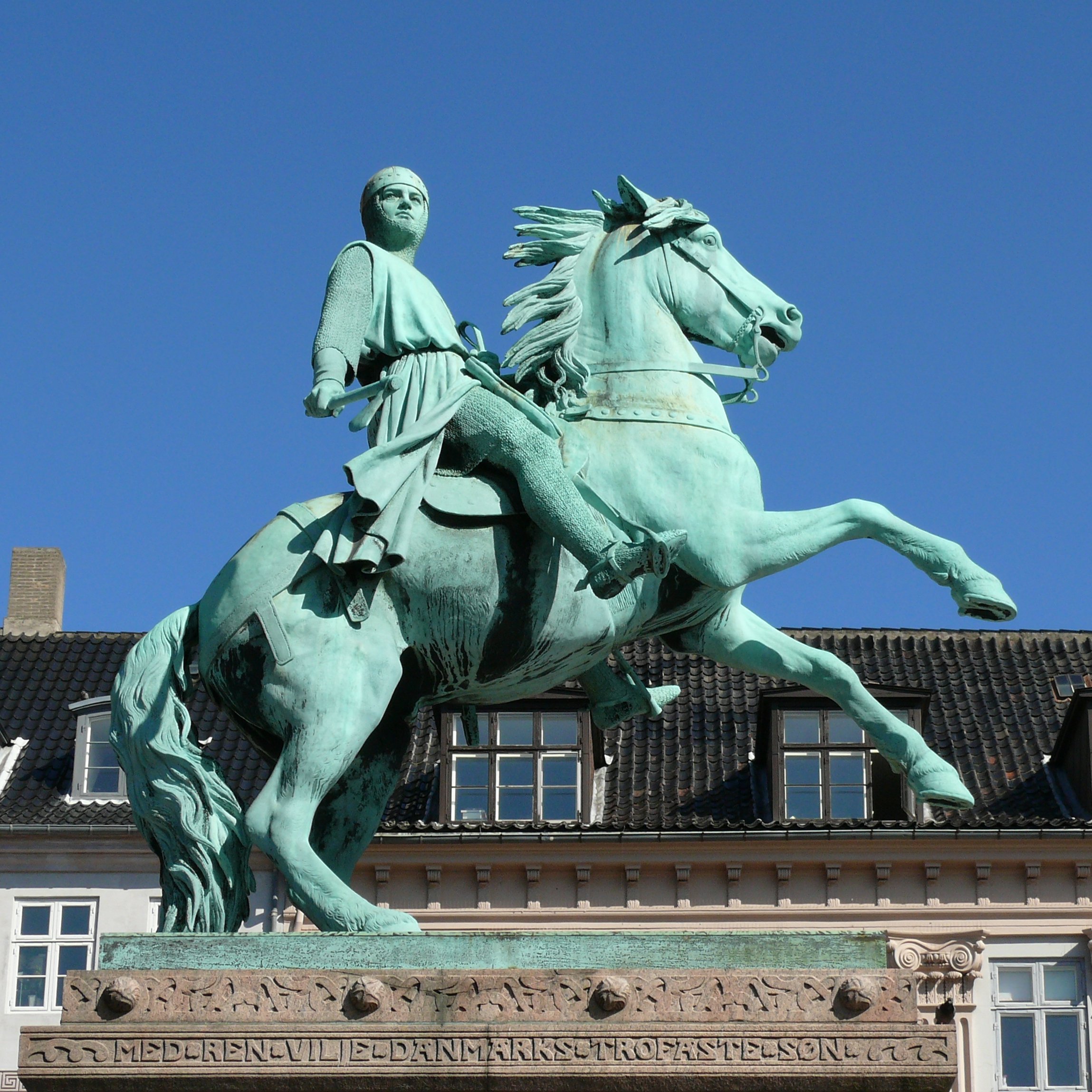 The equestrian statue of Bishop Absalon (1128-1201) The official founder of Copenhagen. It's from 1902 and commemorates his death 700 years ago The engraved letters on the plinth says; He was brave, clever and farsighted. A patron of learning. With pure will, Denmarks faithful son" Rytterstatuen af Biskop Absalon, (1128-1201) Københavns officielle grundlægger. Den er fra 1902 og rejst til minde om hans død 700 år siden. Den indgraverede skrift på soklen siger; Han var modig, snild og fremsynet. En ynder af lærdom. Med ren vilje, Danmarks trofaste søn.